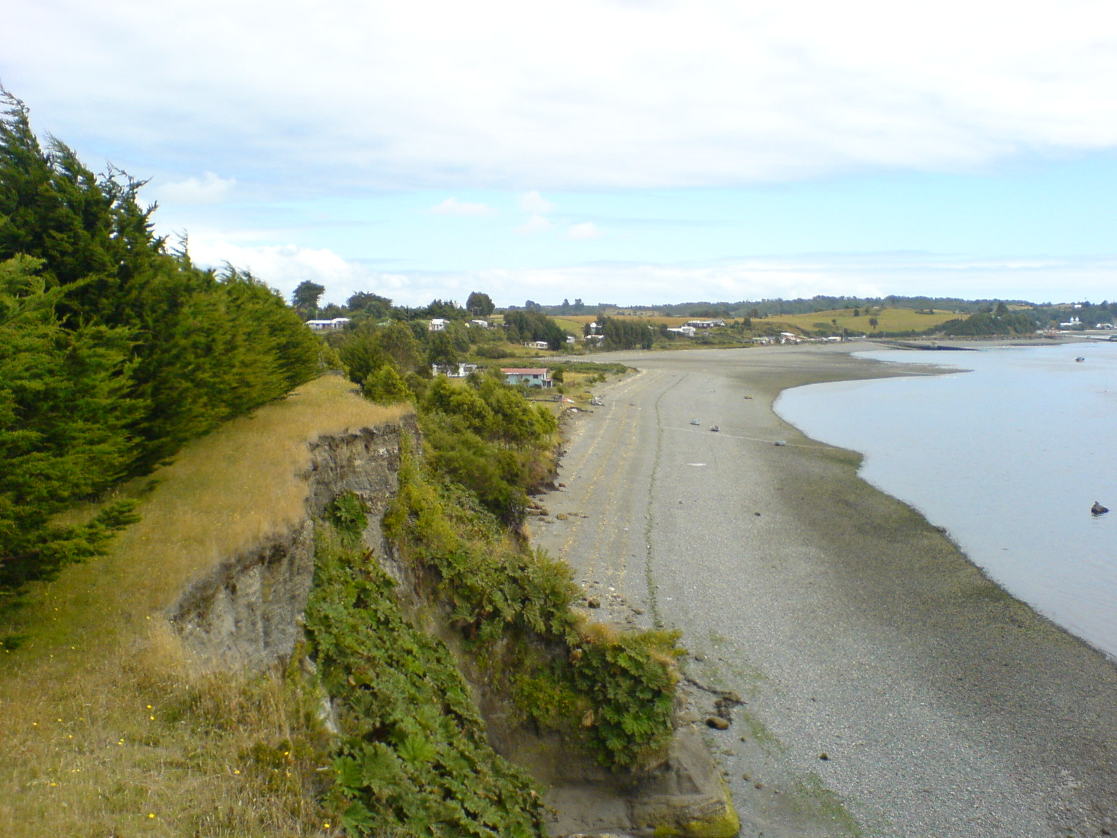 Paisaje de la costa de Chacao, hacia el este (Chiloé, Chile).